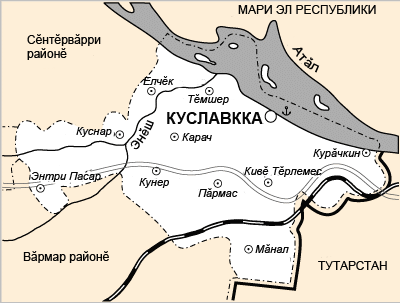 Чăваш Енĕн Куславкка районĕн картти. Map of Kozlovka rayon in Chuvashia